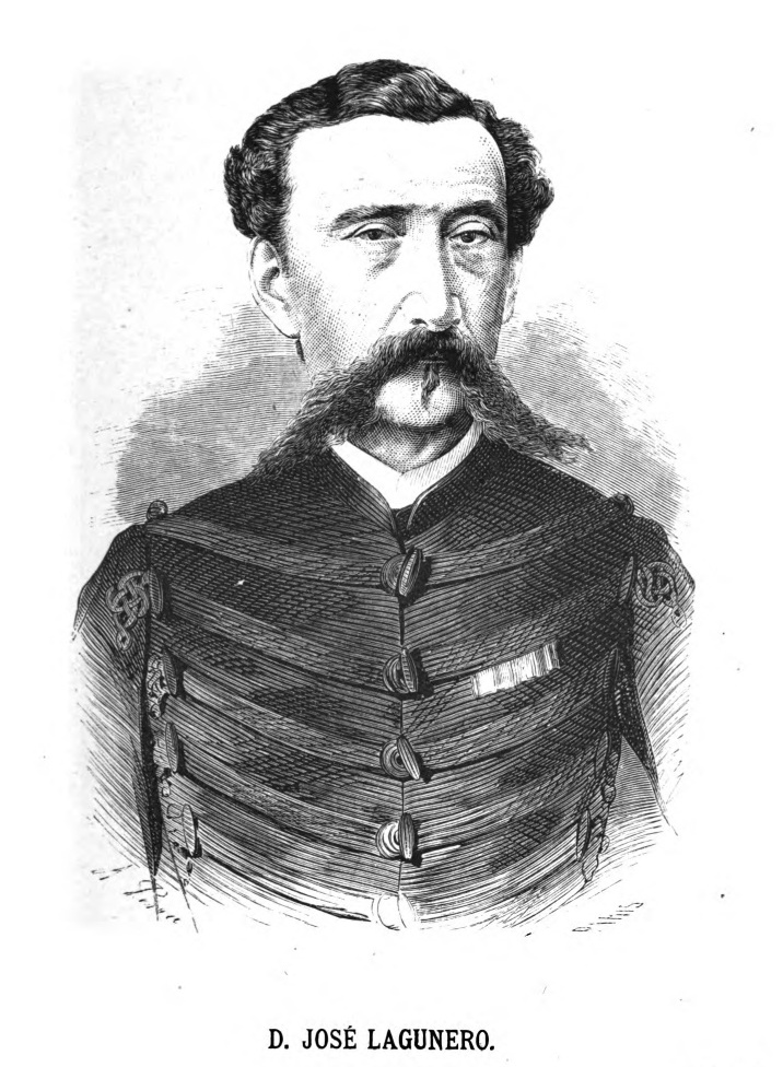 José Lagunero, grabado de Marcelo París por dibujo de Alfredo Perea: Carlos Rubio, Historia filosófica de la revolución española de 1868, Madrid, 1869